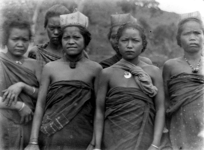 Negatief. Vrouwen van Manggarai uit Pongkor